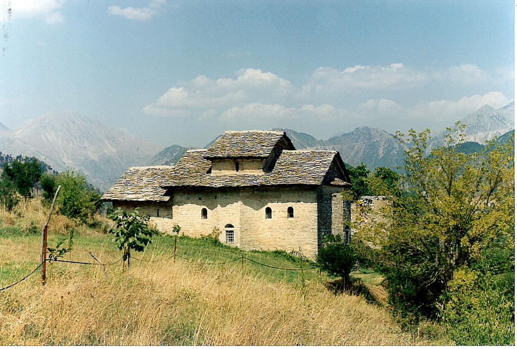 Από πιο κοντά η ιστορική Μονή Σέλτσου